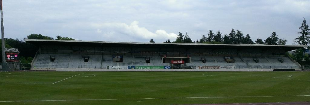 Vue de la Tribune Est du Stade Gaston-Gérard depuis la Tribune Ouest